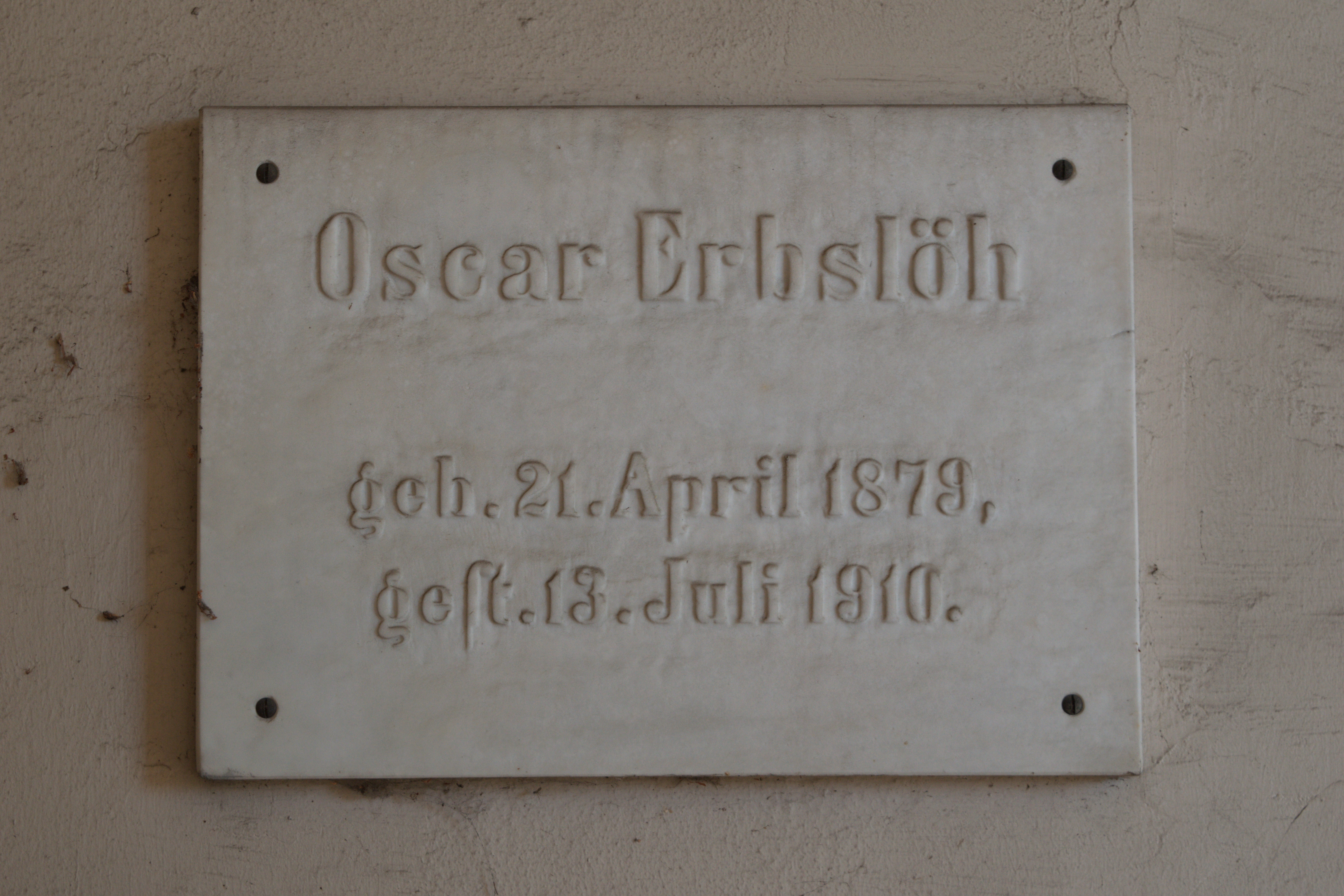 Hochstraße, Wuppertal